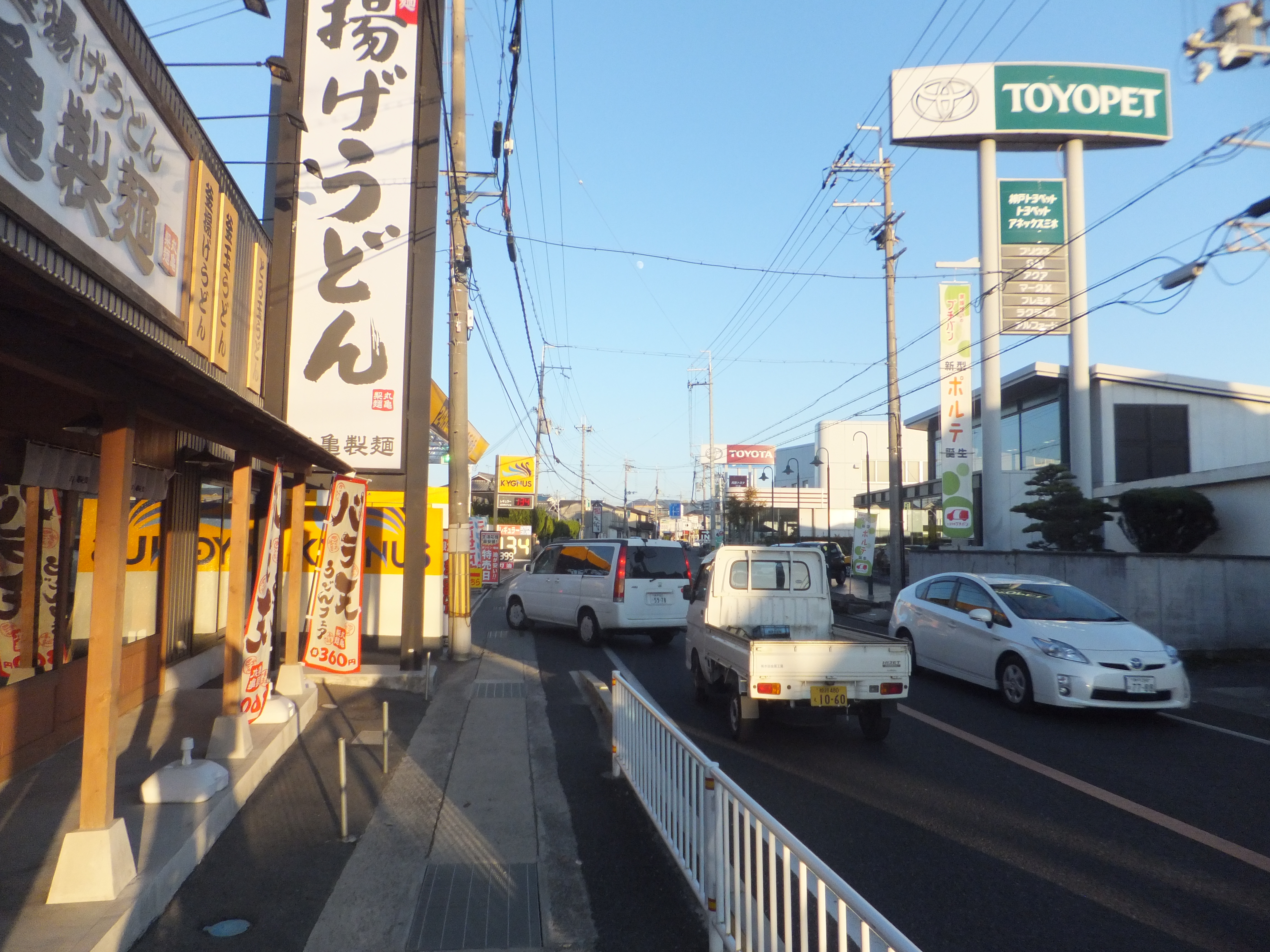 兵庫県三木市別所町小林 ロードサイド店舗